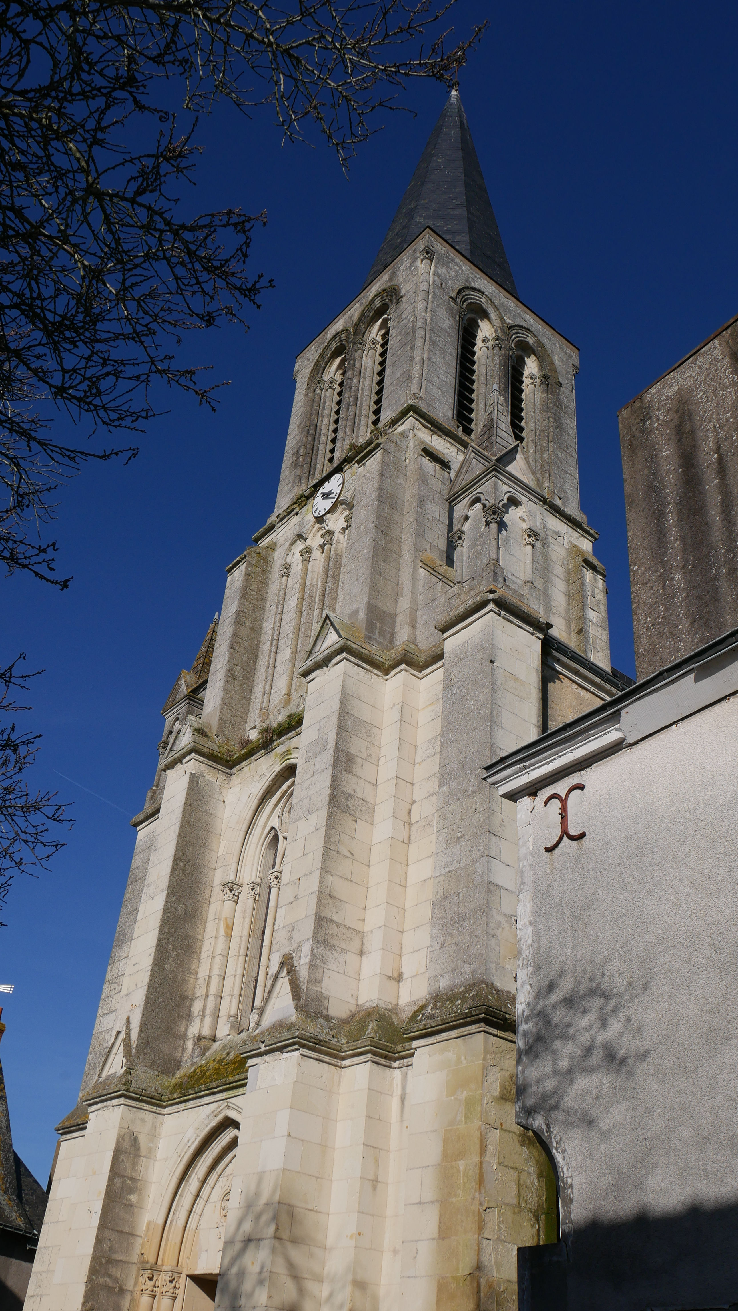 L'église du village de Juvardeil (Maine-et-Loire, France).